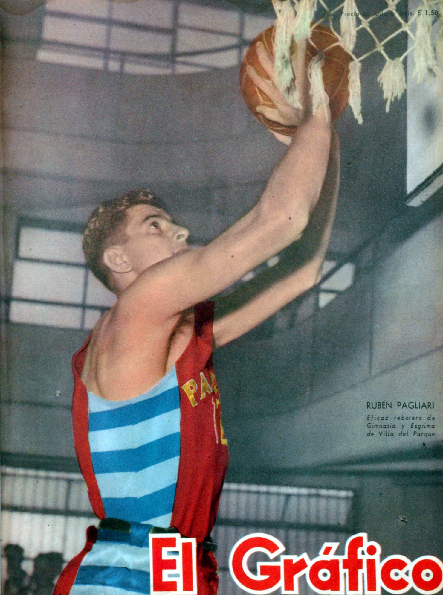 El Grafico del 06 de Marzo de 1953. Edicion 1752